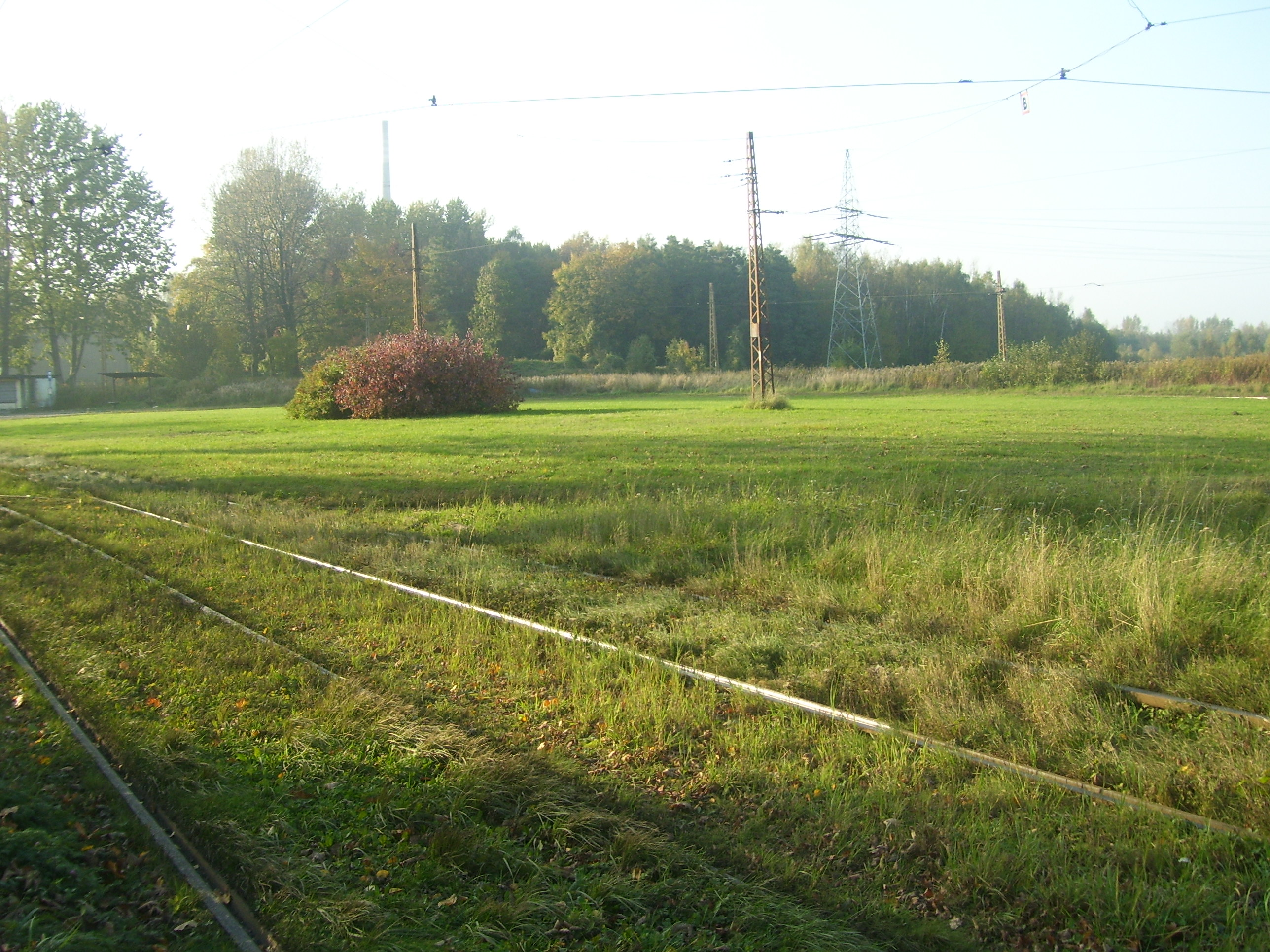 Pętla tramwajowa w Zabrzu